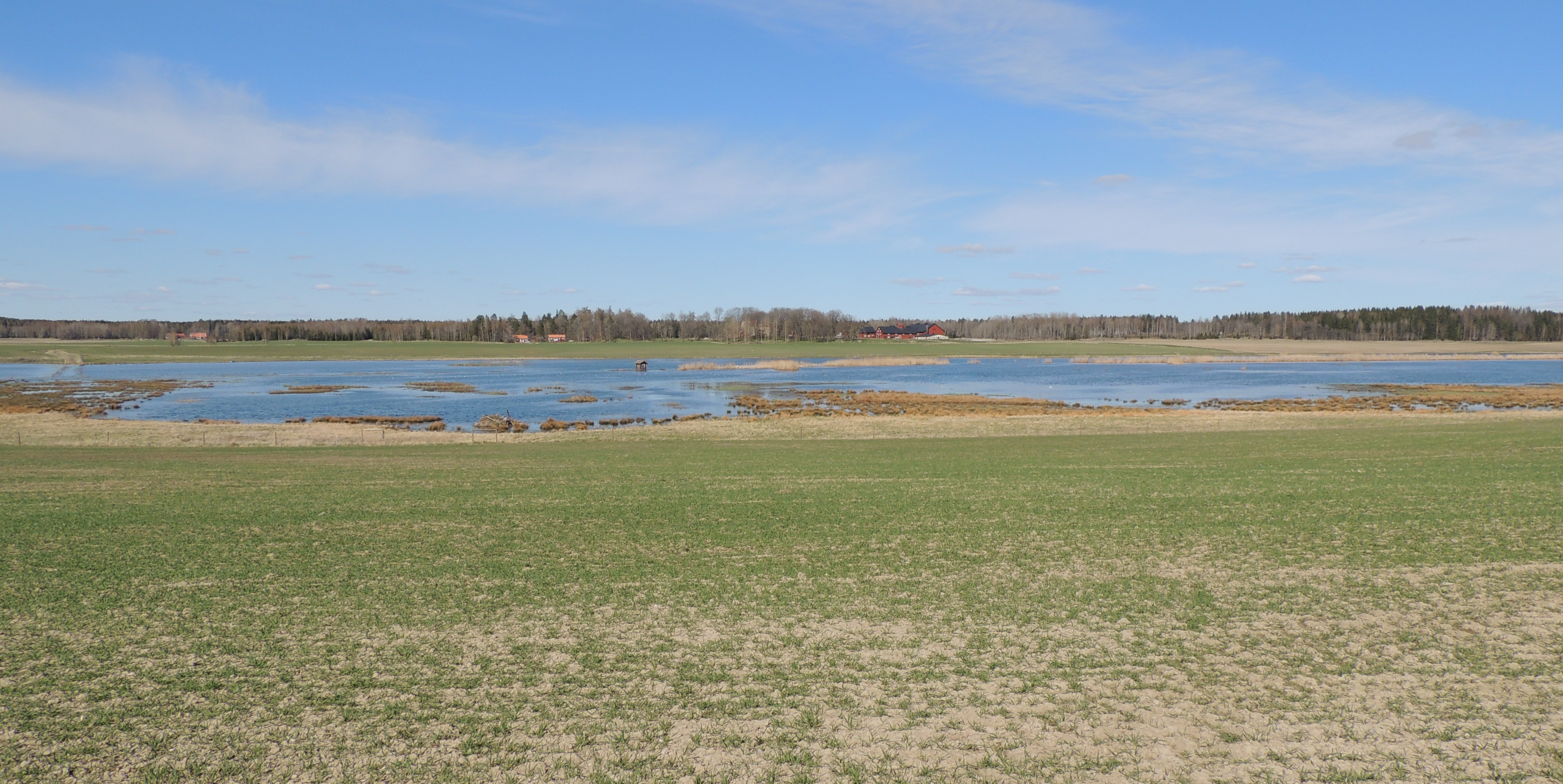 Bild på Frövisjön i april